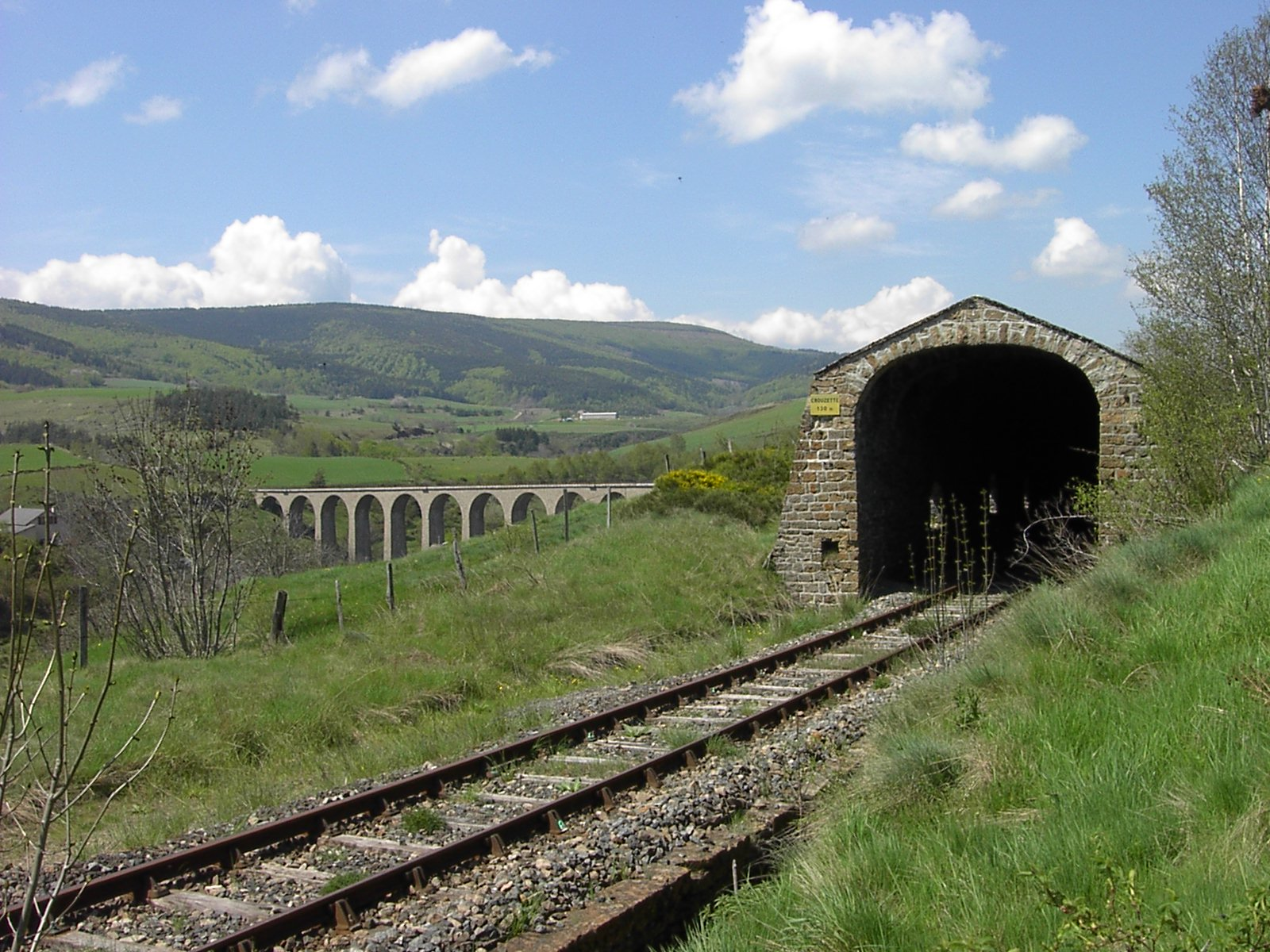 Galerie pare-neige de La Crouzette, sur la ligne de chemin de fer du Monastier à La Bastide - Saint-Laurent-les-Bains (commune de Chasseradès, Lozère, France)